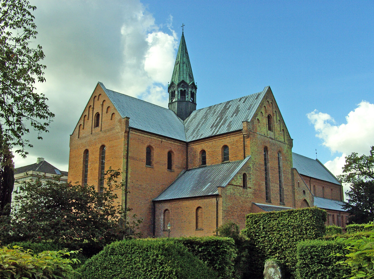 fra nordøst